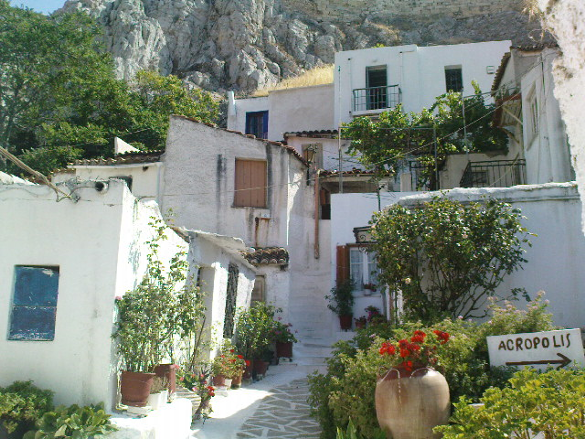 Anafiótika.